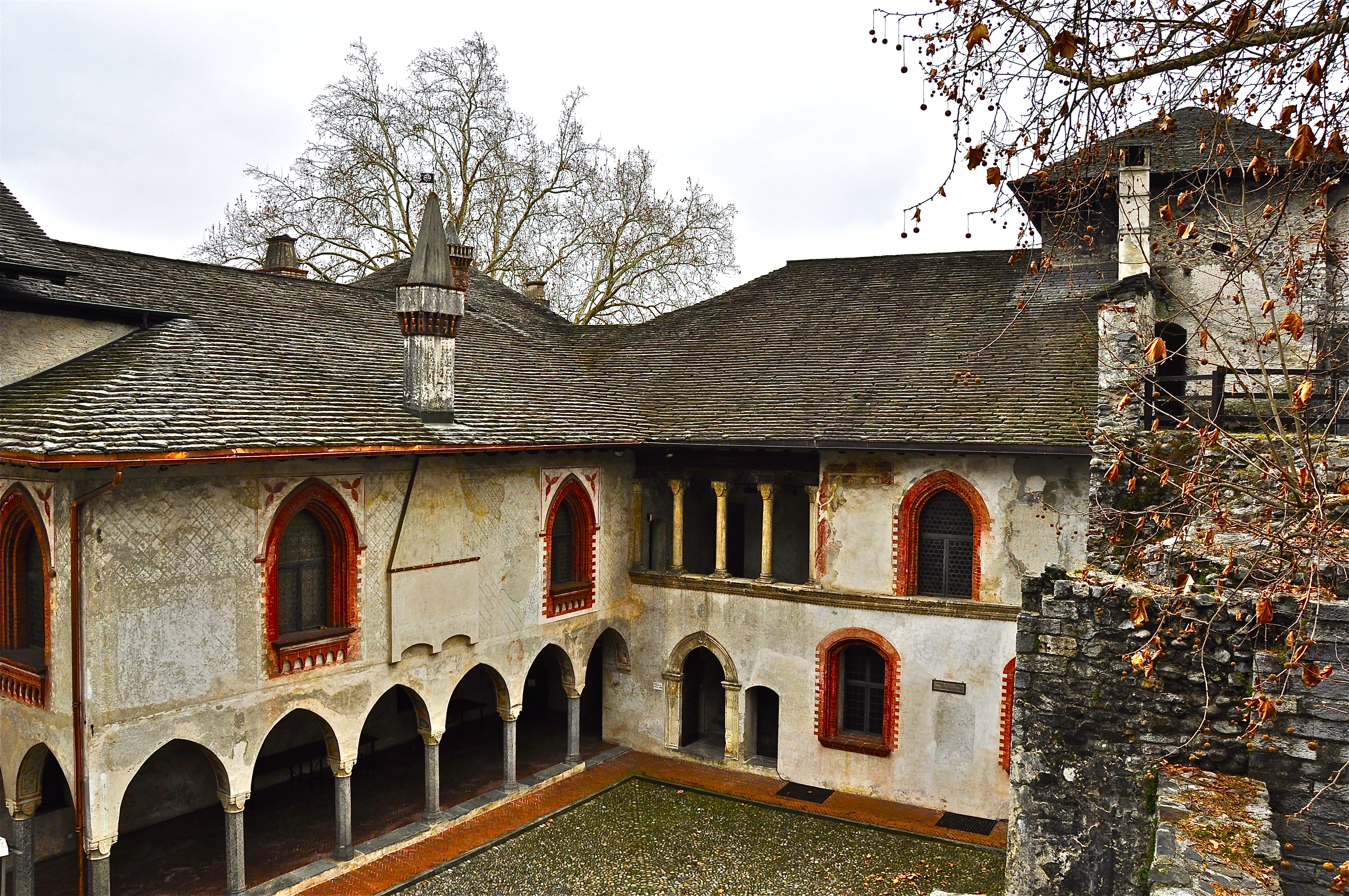 Castello Visconteo, corte interna